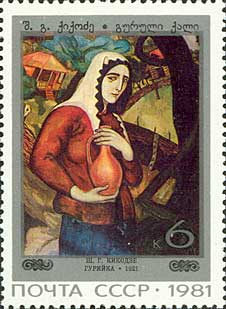 Марка СССР Худ. КИКОДЗЕ Шалва Герасимович (1894-1921). Гурийка.1921. Тбилиси.Государственный музей искусств Грузинской ССР.